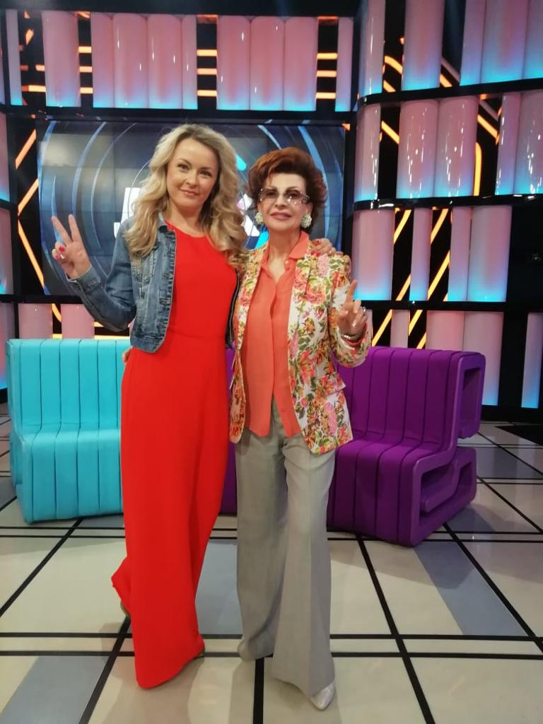 Юлия Ариничева (ВИА «Пламя») и Народная артистка Российской Федерации Роксана Бабаян (справа).